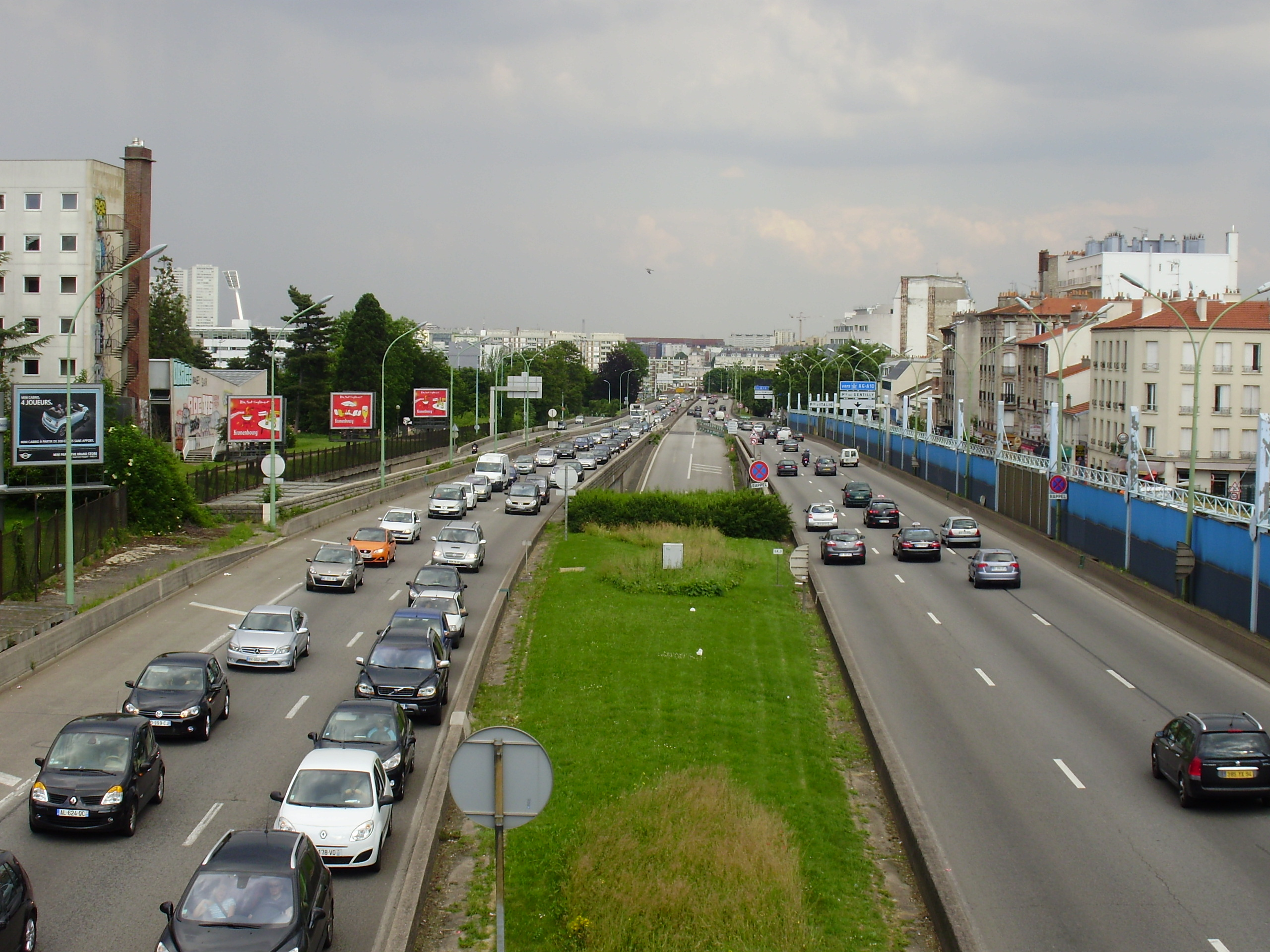 Terre-plein central du boulevard périphérique de Paris, France, à hauteur de Gentilly, en regardant vers l'est. Cette portion élargie du terre-plein central s'explique par la configuration des lieux qui a conduit à prévoir, pour les véhicules venant de l'autoroute A6a et désirant emprunter le boulevard périphérique extérieur, un accès débouchant au milieu du boulevard avec une entrée sur la file de gauche.